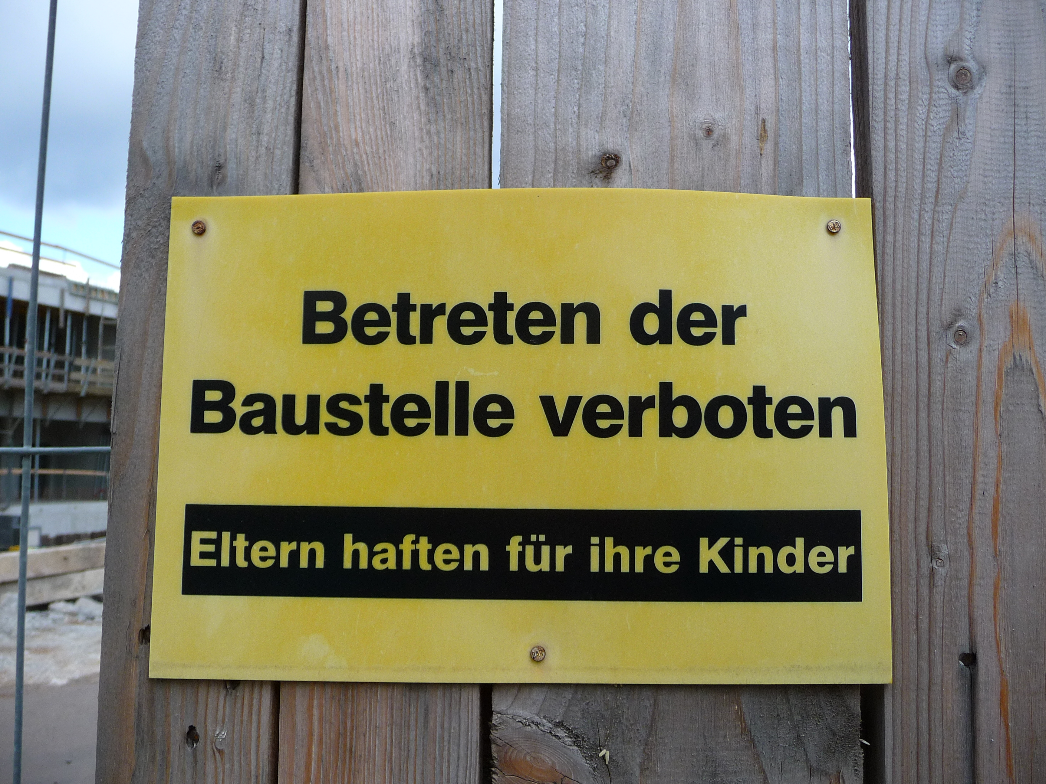 Warnschild "Betreten der Baustelle verboten - Eltern haften für ihre Kinder", fotografiert in Heidelberg (Baden-Württemberg, Deutschland)